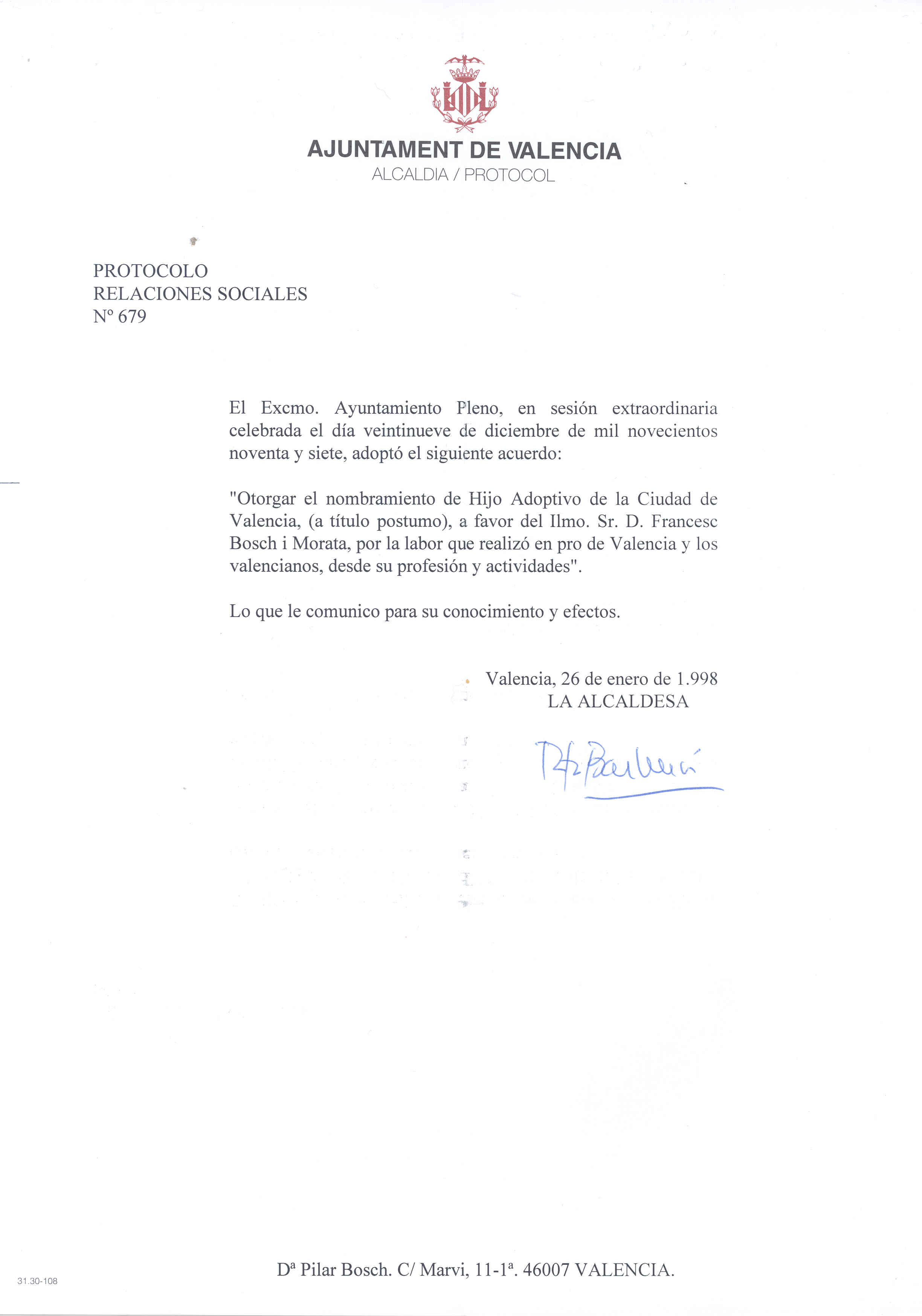 Nomenament oficial per l'Ajuntament de València de Francesc Bosch i Morata, com a Fill Adoptiu de la Ciutat; signat per l'Alcaldessa de València, Rita Barberà, el 26 de gener de 1998.